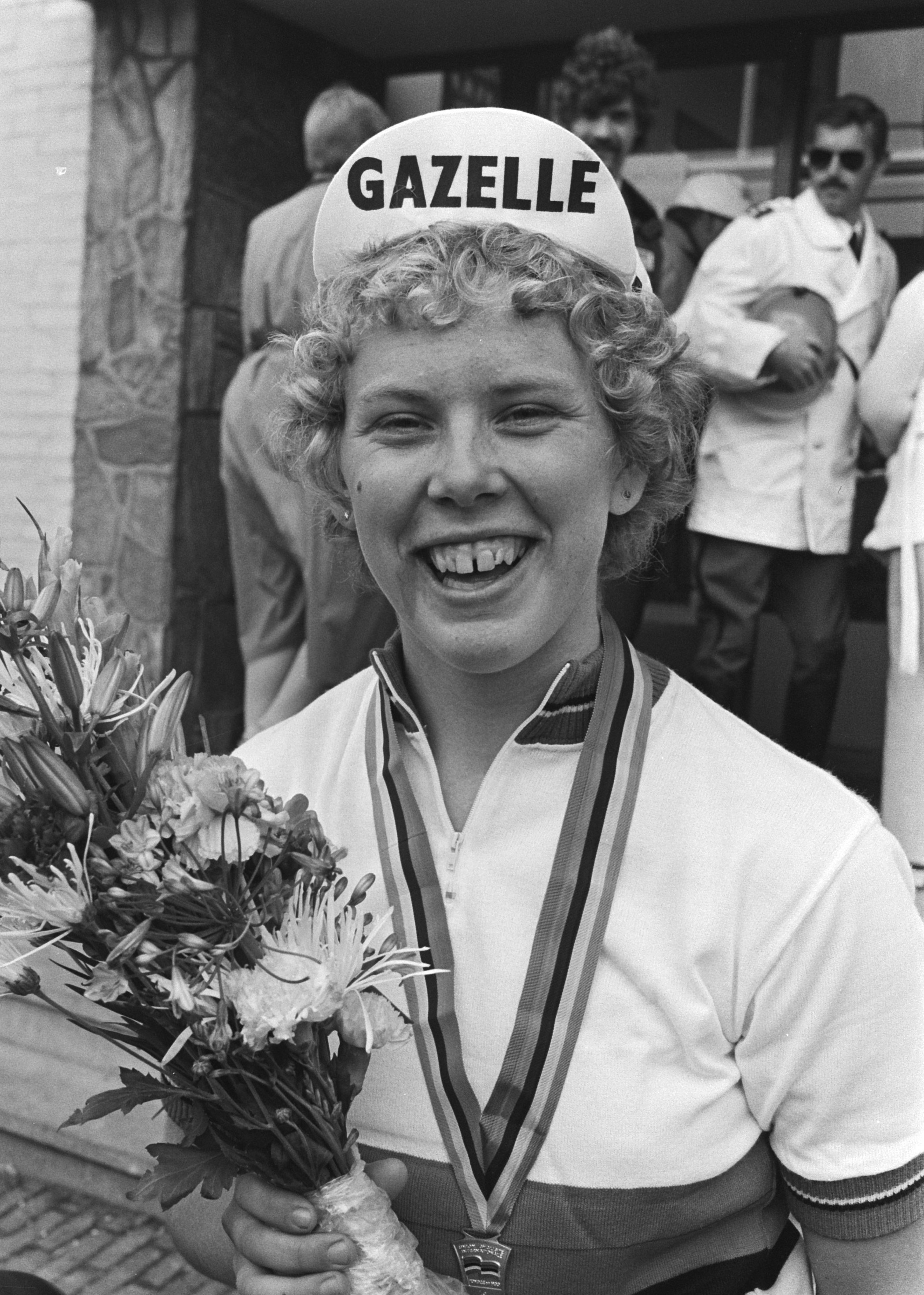 Wereldkampioenschappen Wielrennen Dames 1979 te Valkenburg. Wereldkampioene Petra de Bruin in de regenboogtrui